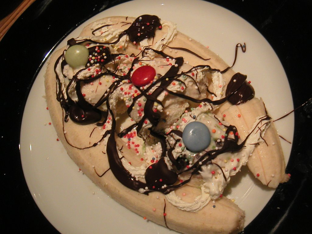 Banana split